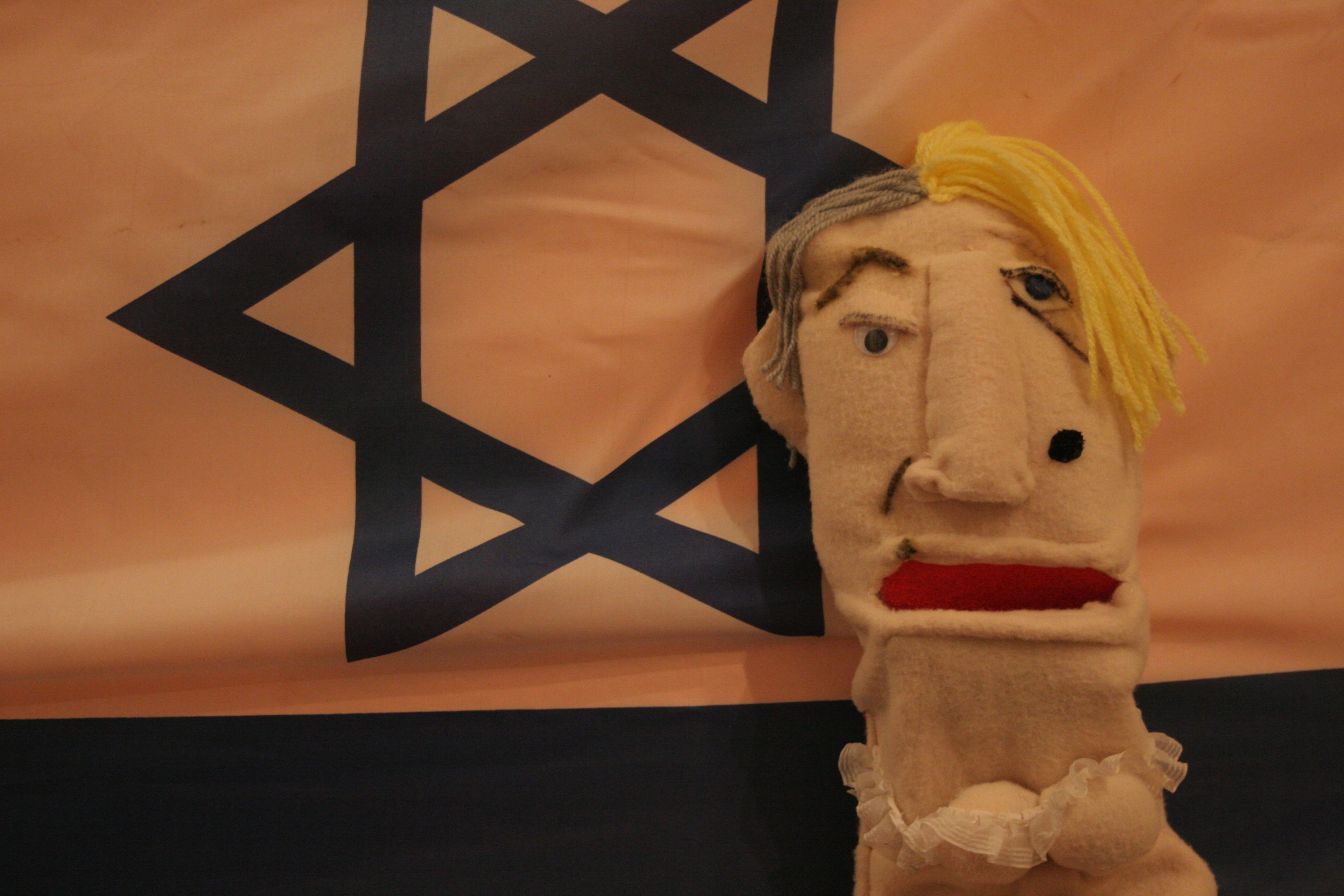 מתוך סדרת האינטרנט ביבני קונטרול